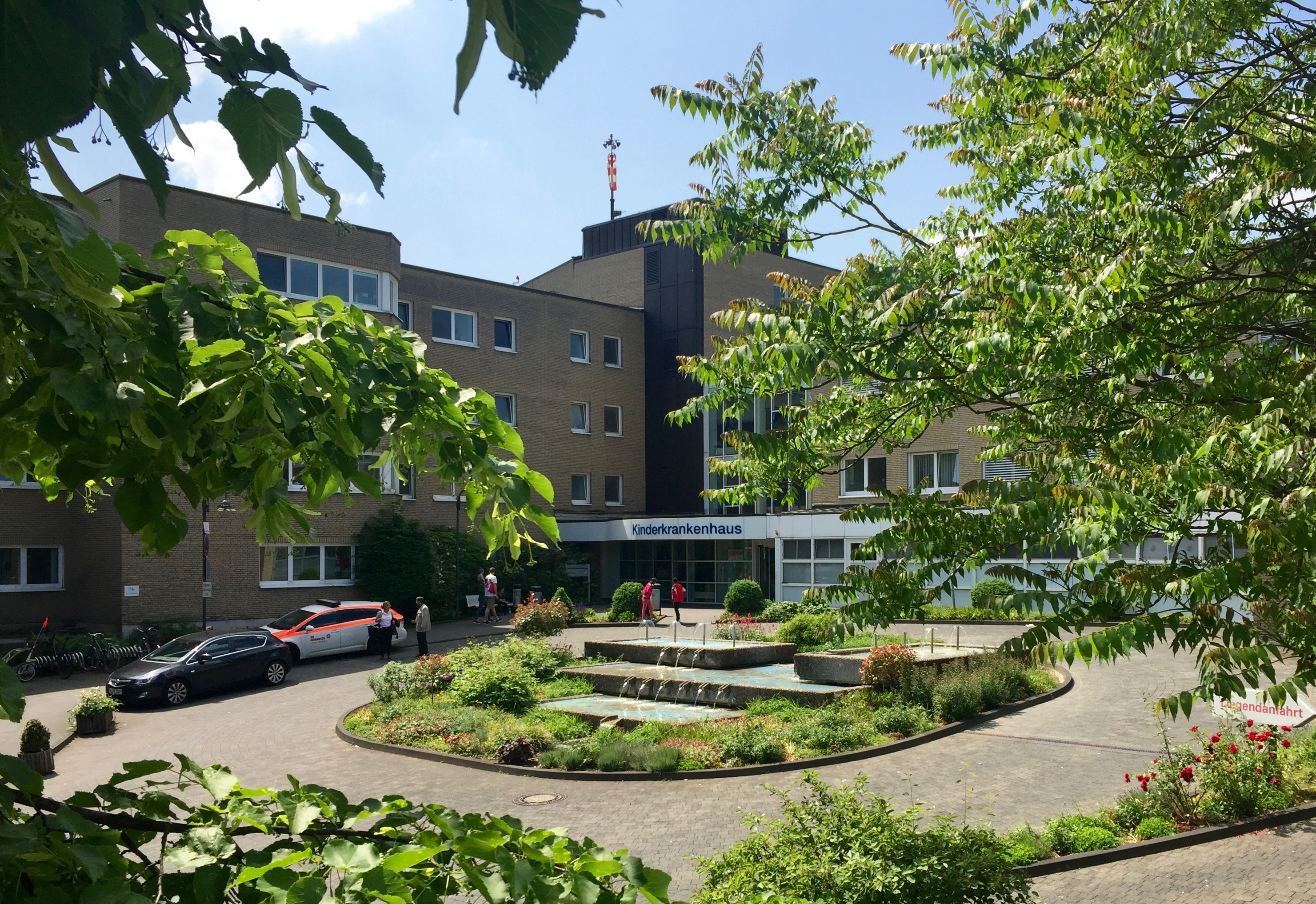 Köln-Riehl: Kinderkrankenhaus an der Amsterdamer Straße. Erbaut von 1959 - 1963 nach Plänen von Prof. Schachner. Damals größte Kinderklinik Deutschlands.